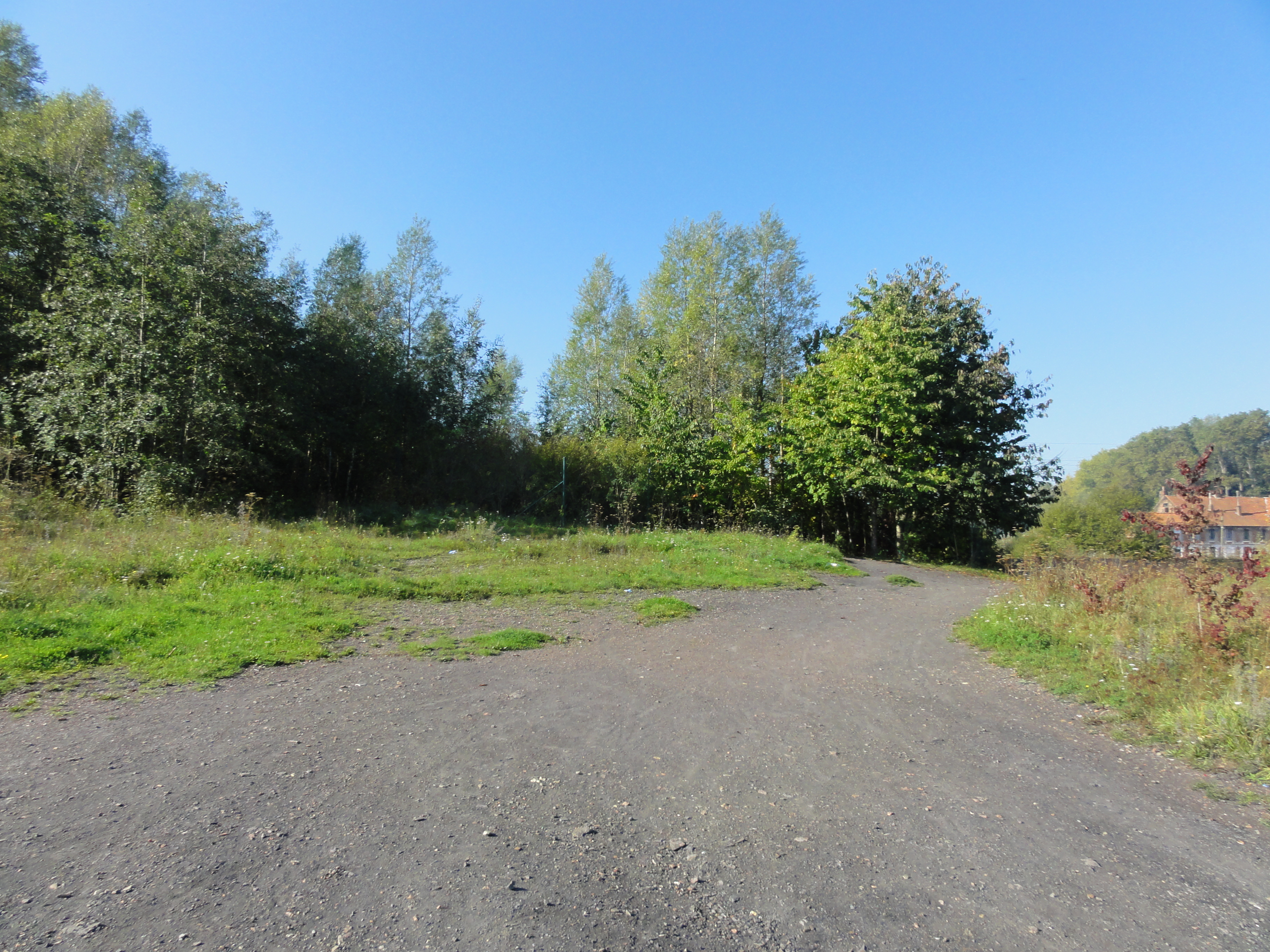 Terril n° 259 dit Centrale électrique de Gosnay, centrale thermique de Gosnay de la Compagnie des mines de Bruay dans le bassin minier du Nord-Pas-de-Calais, Gosnay et Bruay-la-Buissière, Pas-de-Calais, Nord-Pas-de-Calais, France.